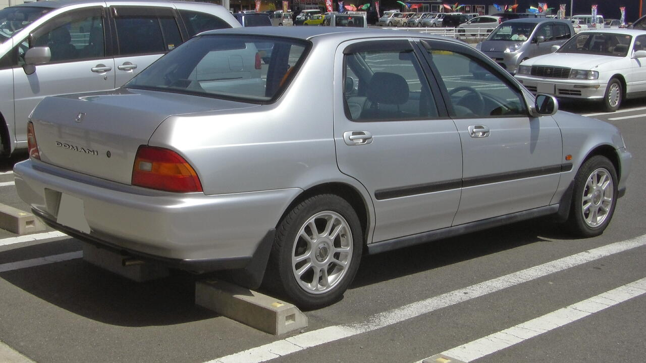 初代ホンダ・ドマーニ